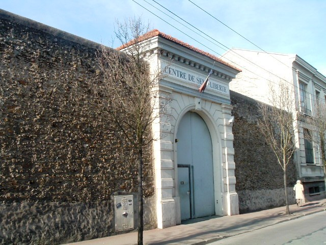 Centre de semi-liberté de Corbeil-Essonnes (91)